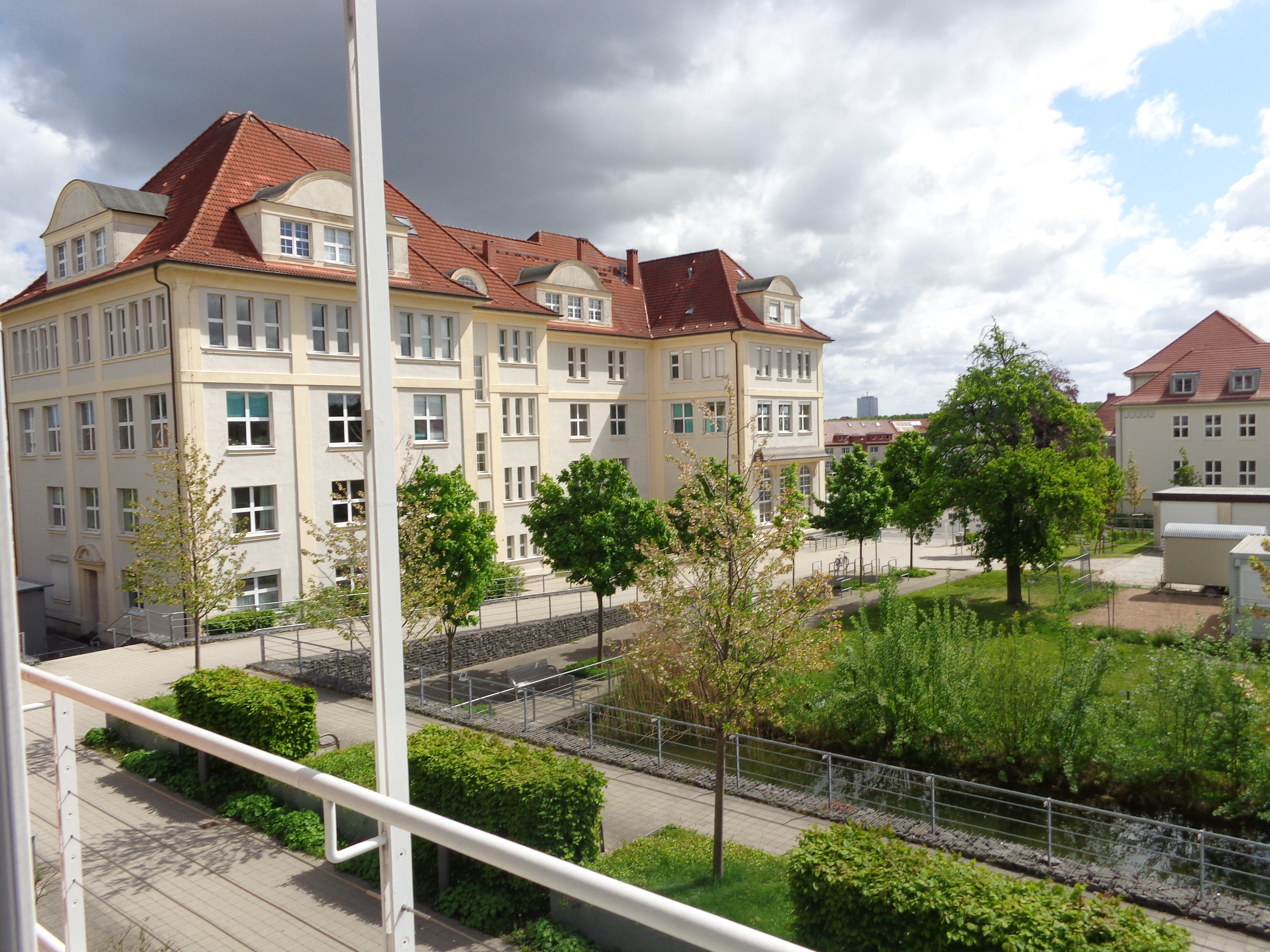 Pathologiegebäude im Universitätsklinikum Rostock